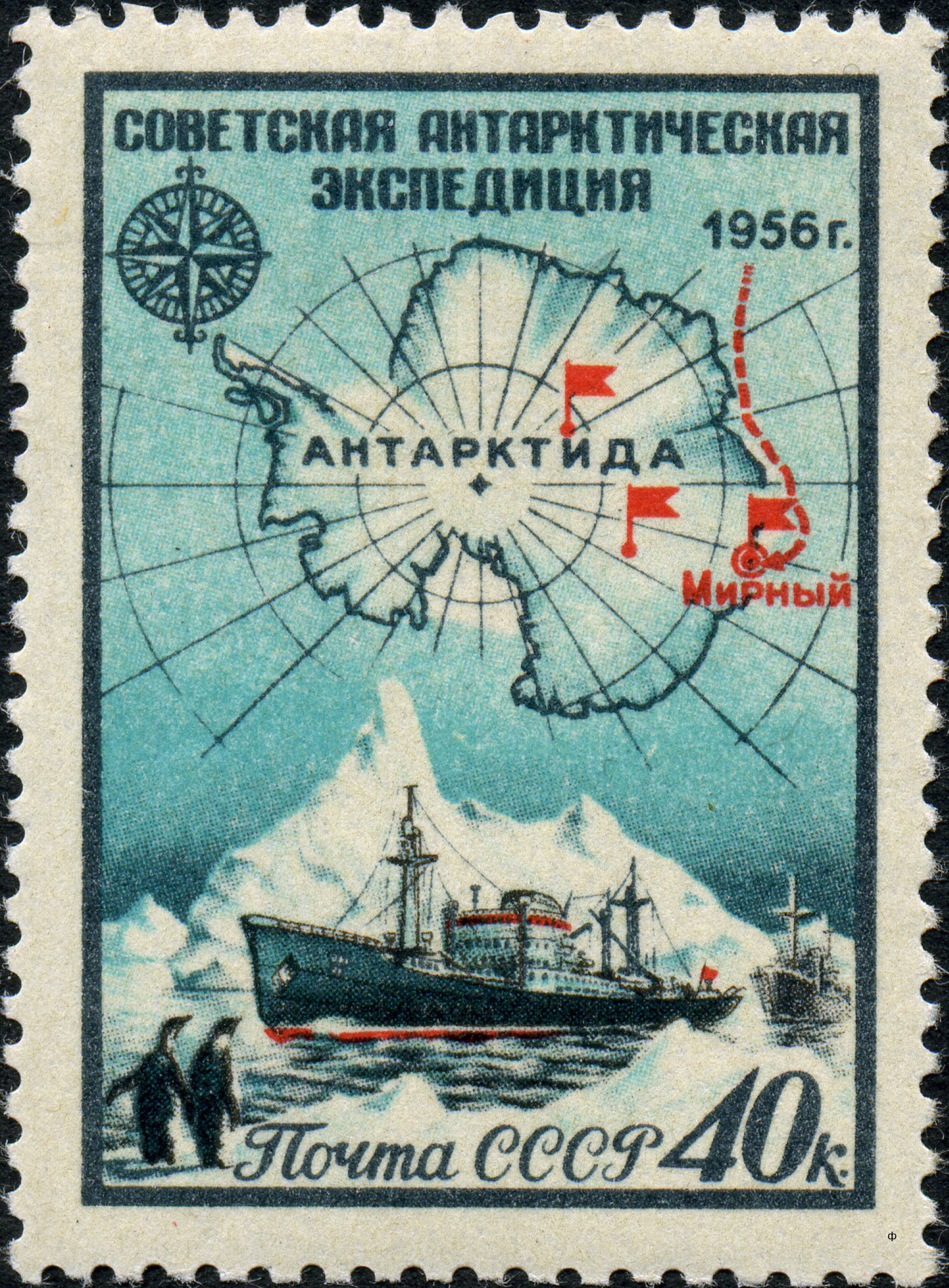 Почтовая марка СССР, выпущенная в октябре 1956 года и посвящённая Советской антарктической экспедиции. На марке изображены корабли экспедиции, карта Южного полярного бассейна с обозначенными на ней маршрутом экспедиции и станцией «Мирный», открытой 13 февраля 1956 года. Художник — Е. Гундобин. Номер по каталогу ЦФА — 1956. Тираж — 3 млн экз.